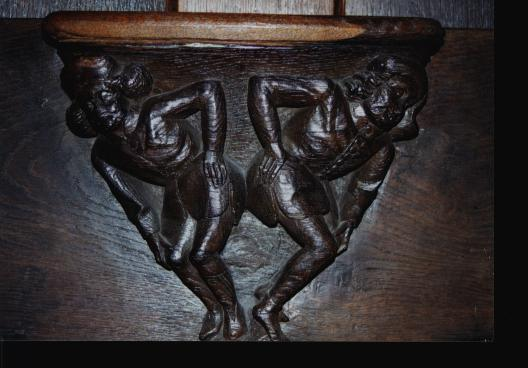 Miserikordie Basilika St Quirin Darstellung Stippeföttche 16.Jh